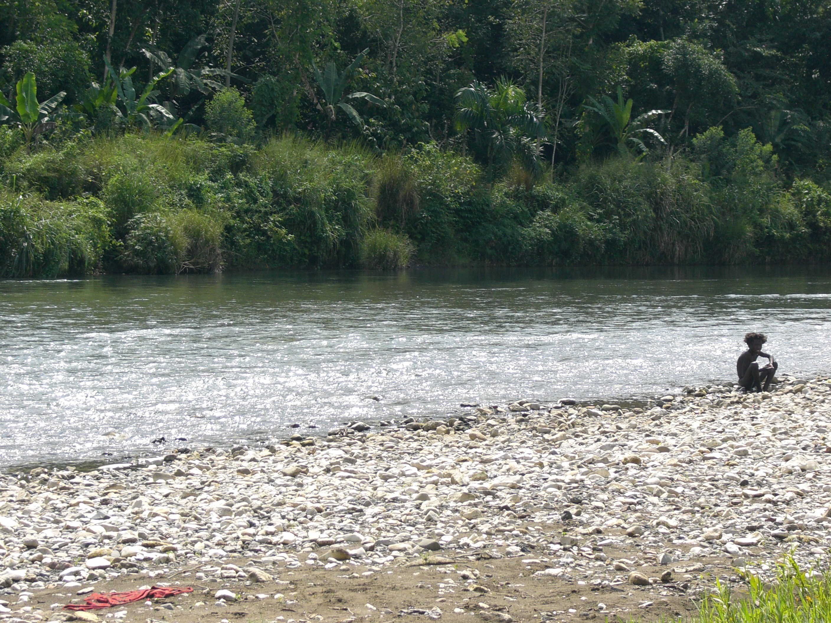 Grande-Anse River, Haiti